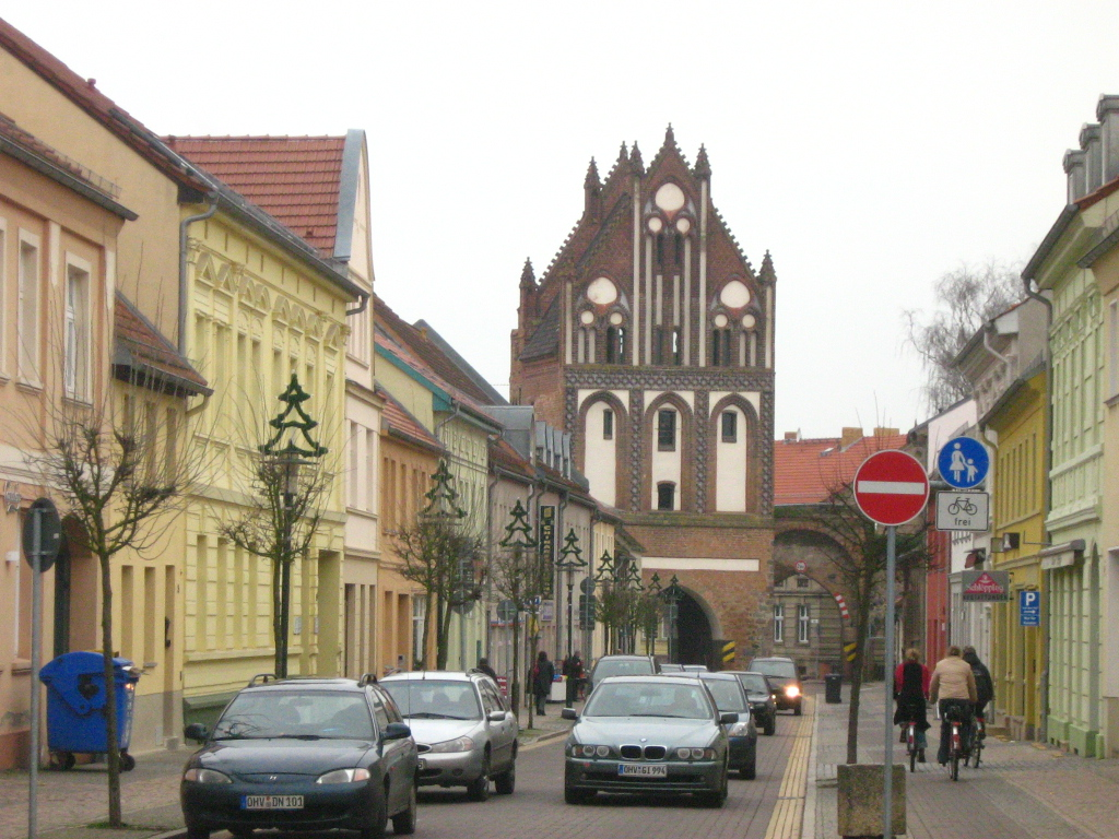 Hauptstraße mit „Ruppiner Tor“ in Gransee (Landkreis Oberhavel)